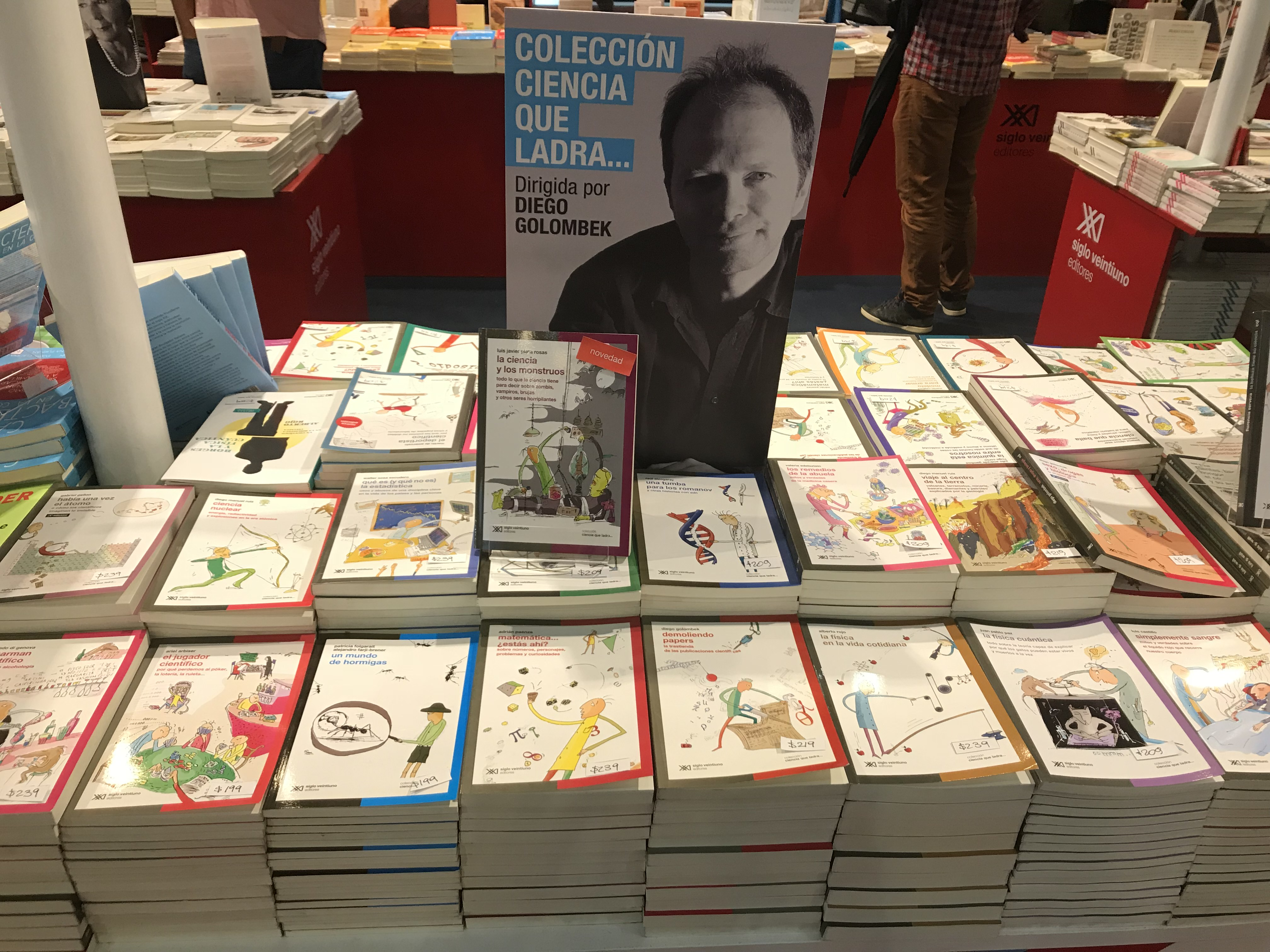 Colección "Ciencia que ladra..." en Feria del libro 2018, Buenos Aires, Argentina